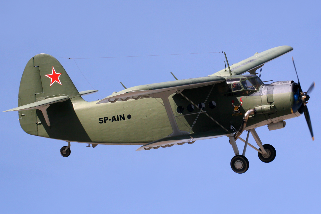 Madrid - Cuatro Vientos (LECU/LEVS)